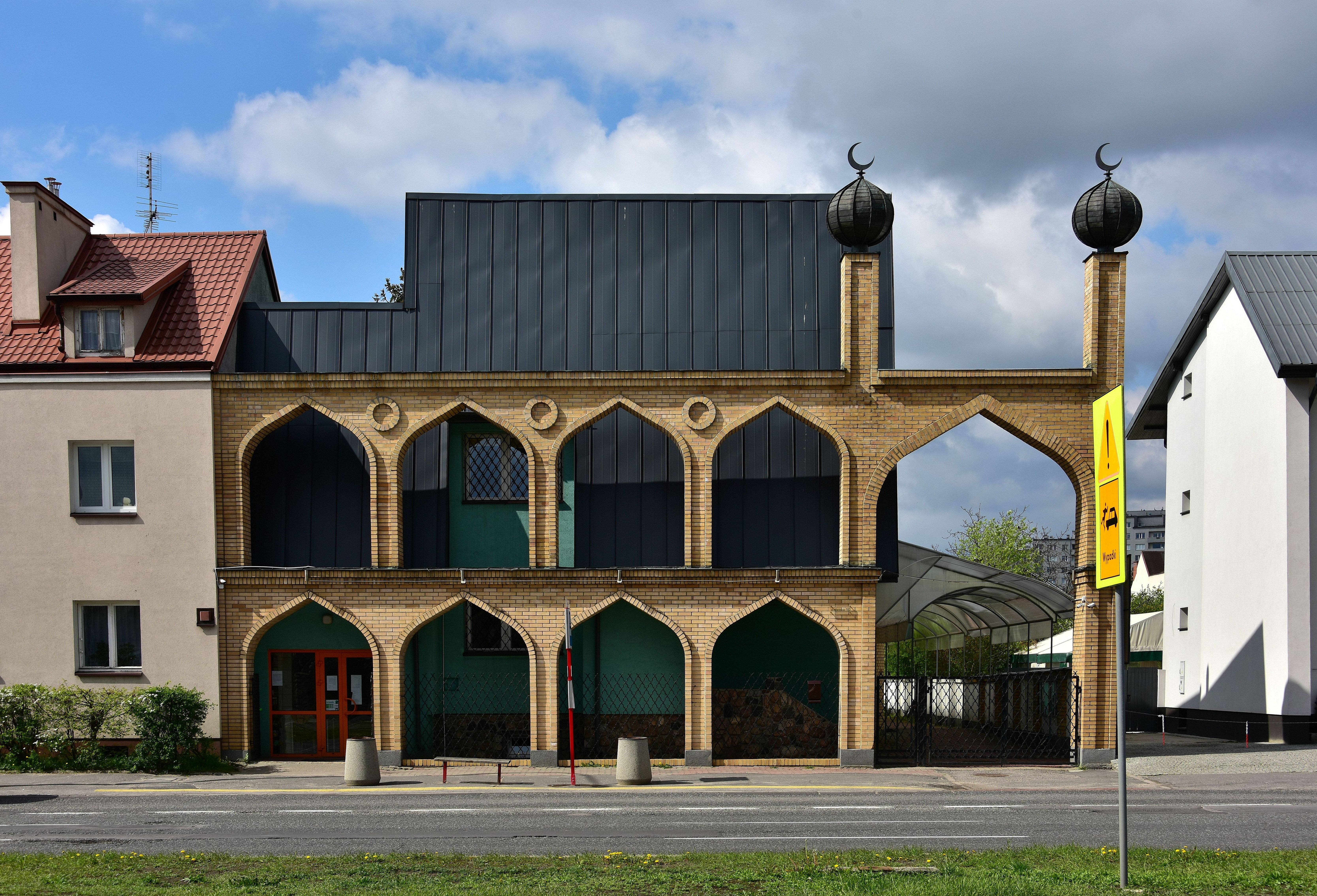 Meczet przy ul. Wiertniczej 103 w Warszawie